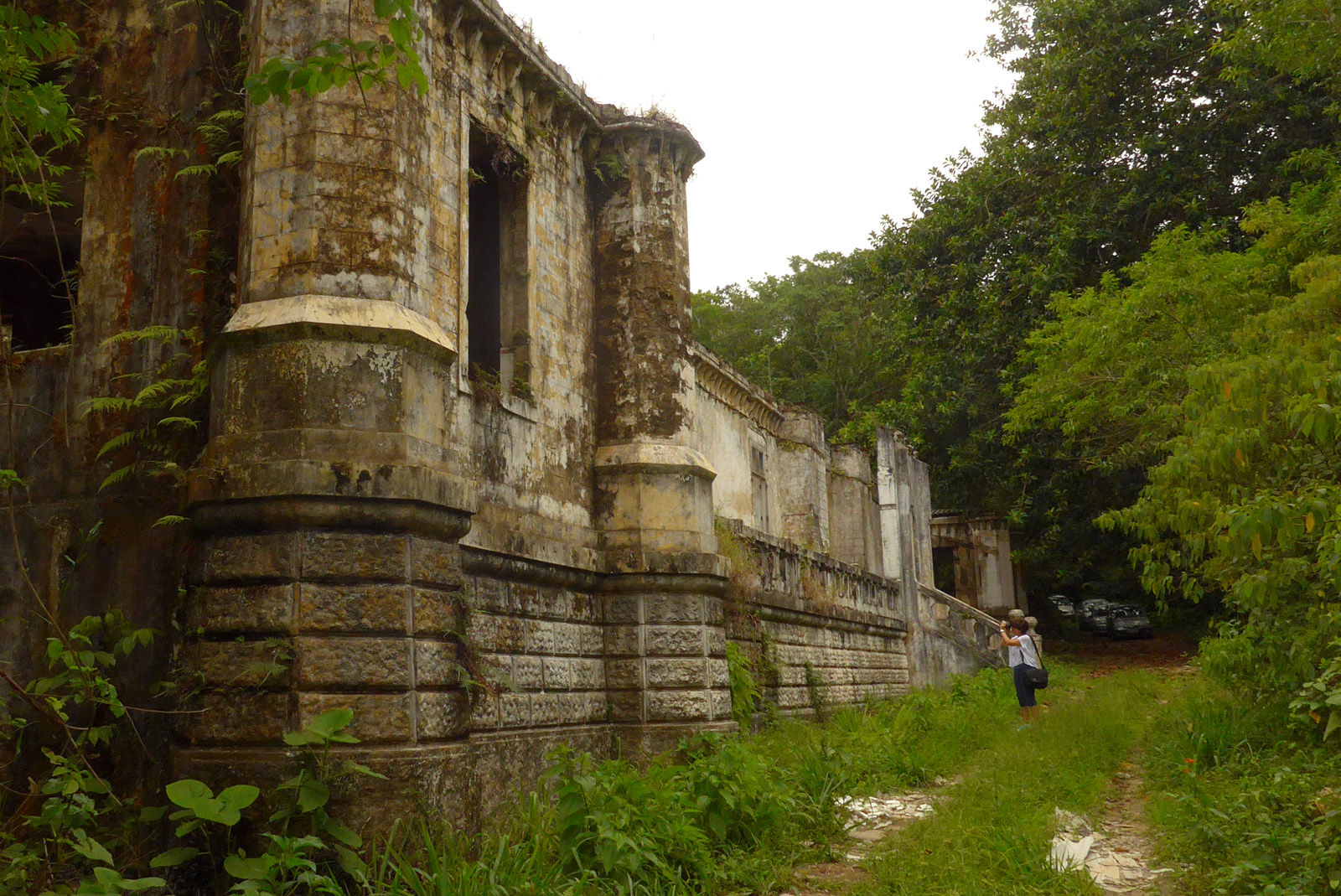 Ruínas da fortaleza Jurubatuba (Forte Itaipú) em Praia Grande, SP.